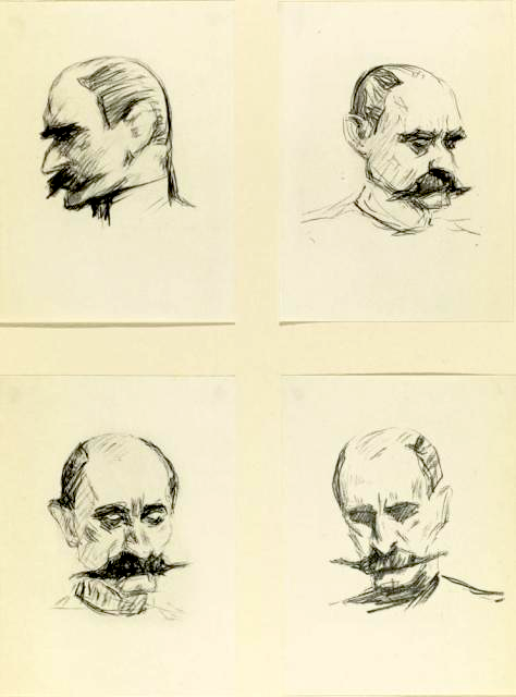 Portraits du commandant Esterhazy lors du procès Zola, par Paul Renouard, 1899